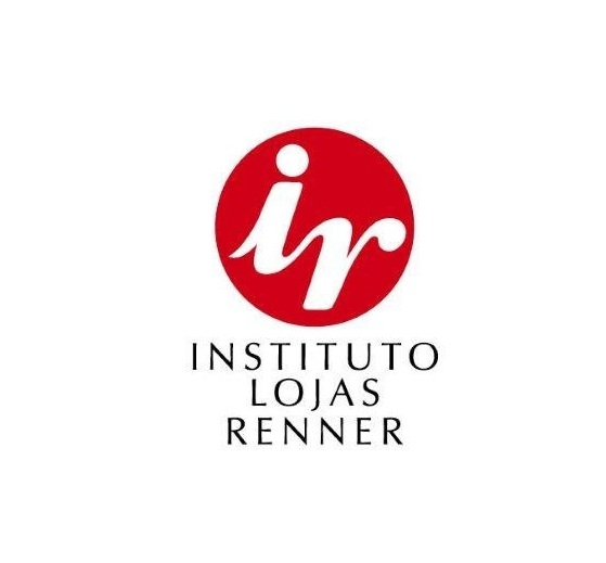 Logo do Instituto Lojas Renner